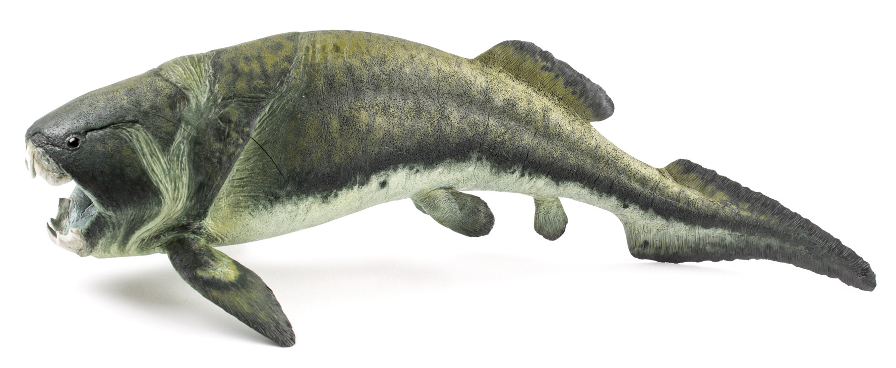 Riproduzione in scala 1:15.